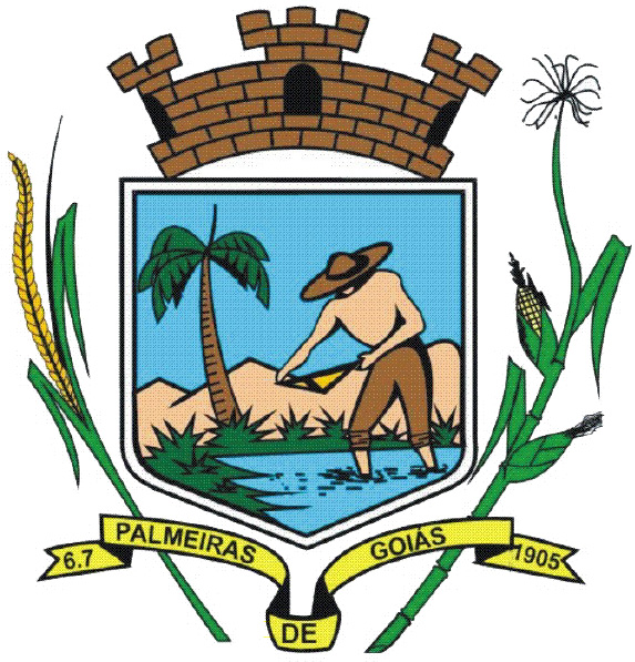 Braçao Palmeiras de Goiás, Goiás, Brasil